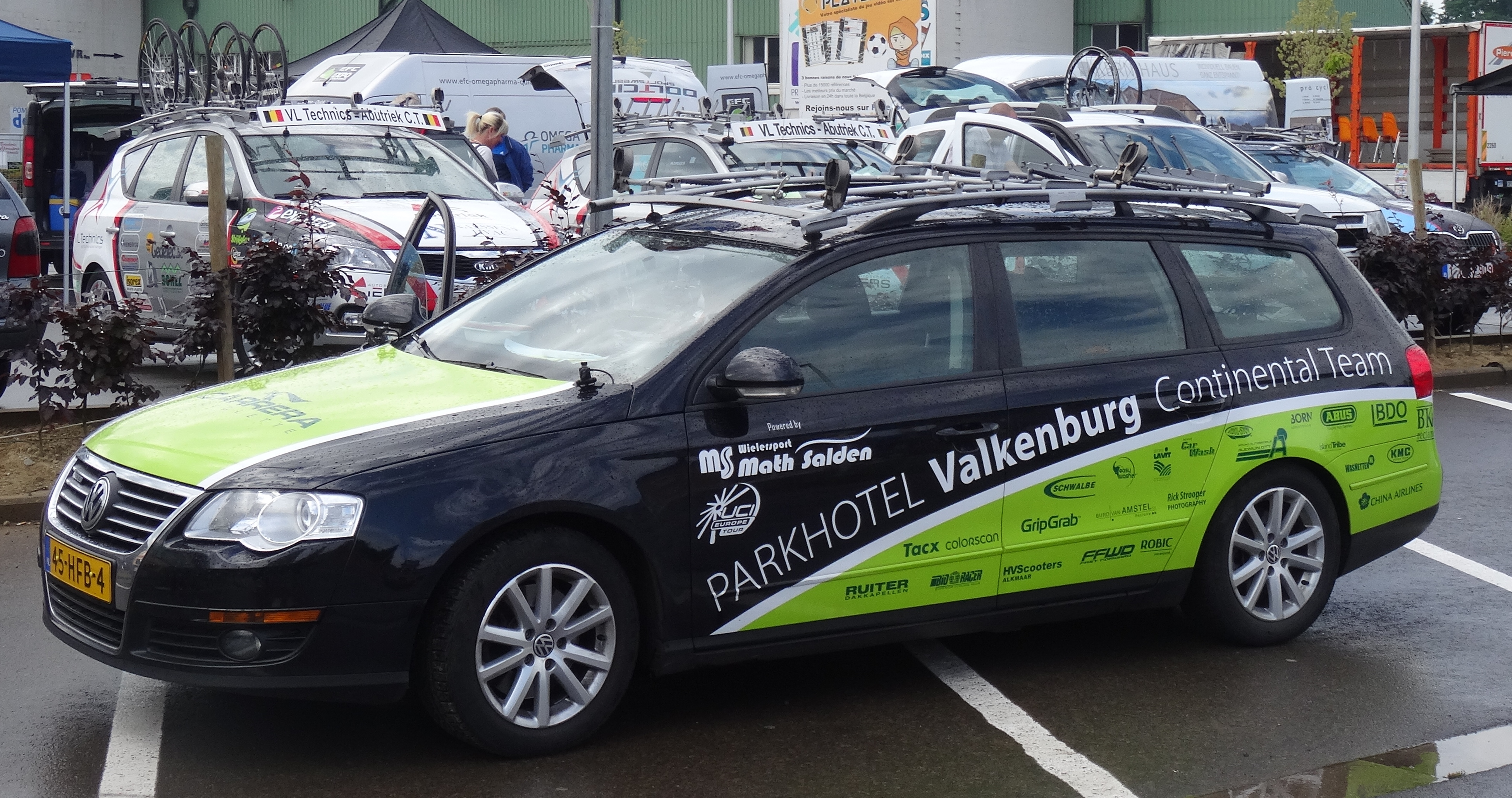 Reportage réalisé le dimanche 8 juin à l'occasion du départ du Mémorial Philippe Van Coningsloo 2014 à Wavre, Belgique.